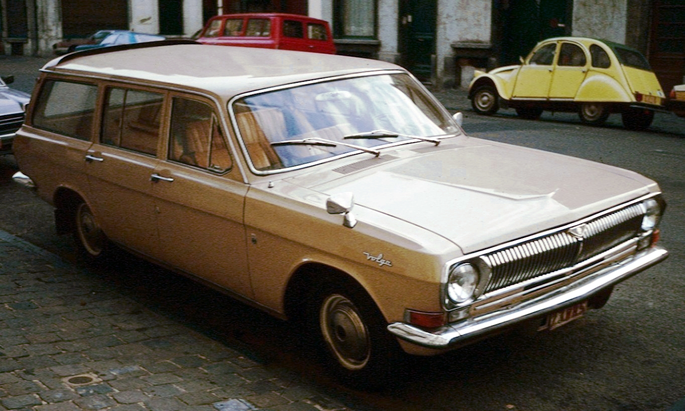 Volga station wagon in Flanders